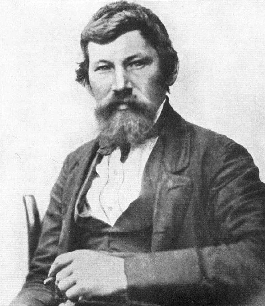 portrét Anrease Grolla